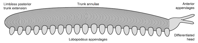 Reconstruction of Helenodora inopinata. Modified from Thompson & Jones [8] with the addition of differentiated head, frontal appendages, limbless posterior extension, and modification to limb morphology to reflect the new interpretations presented herein. Details of the cuticle of the limbs has been excluded as it is not preserved in the available material